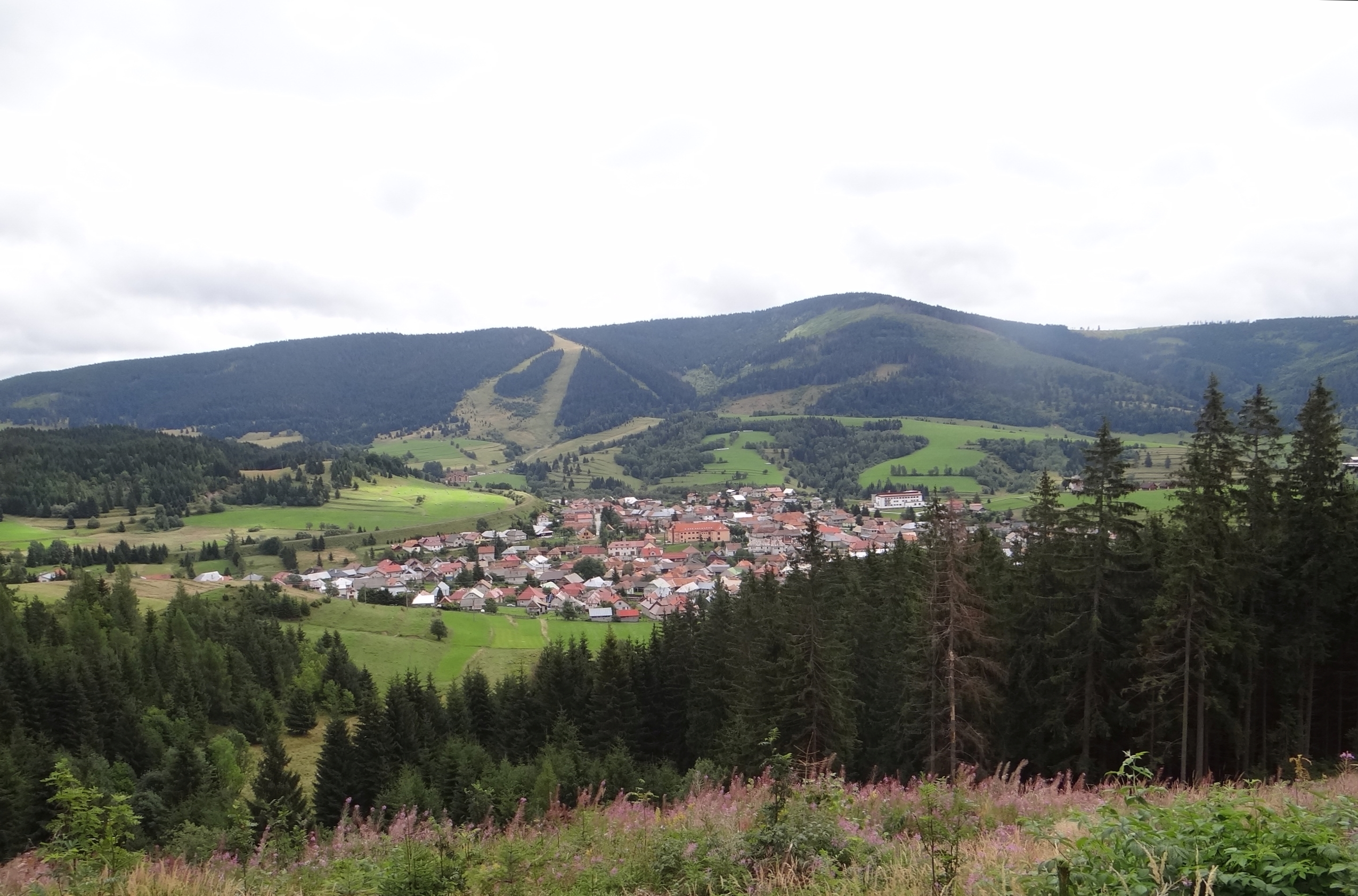 Widok ze zboczy Kralova hola. W dole Telgart